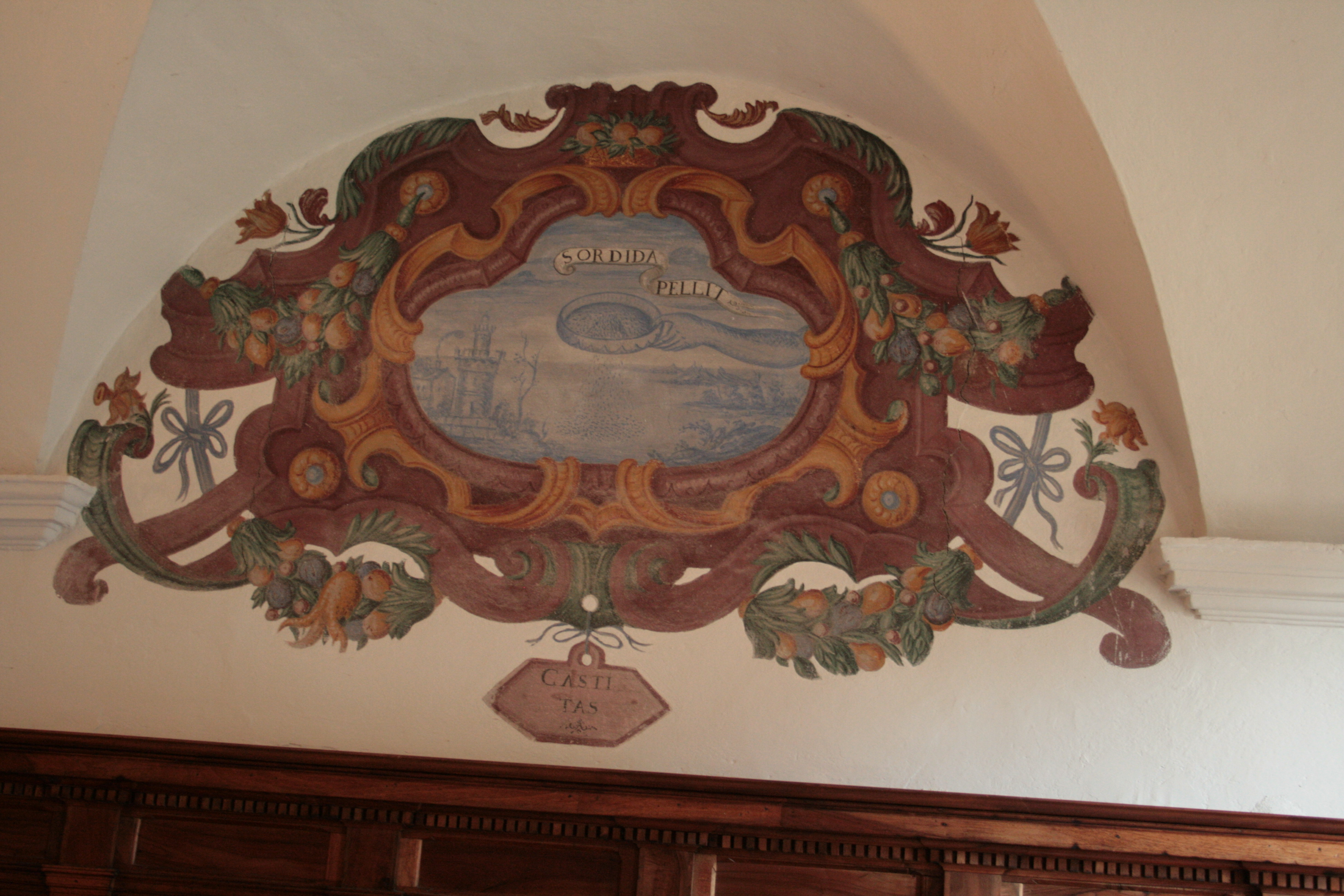 Saorge, Alpes-Maritimes, France, Monastère franciscain, fresques du réfectoire, 17e siècle, illustrant les vertus franciscaines. Ici, la chasteté.